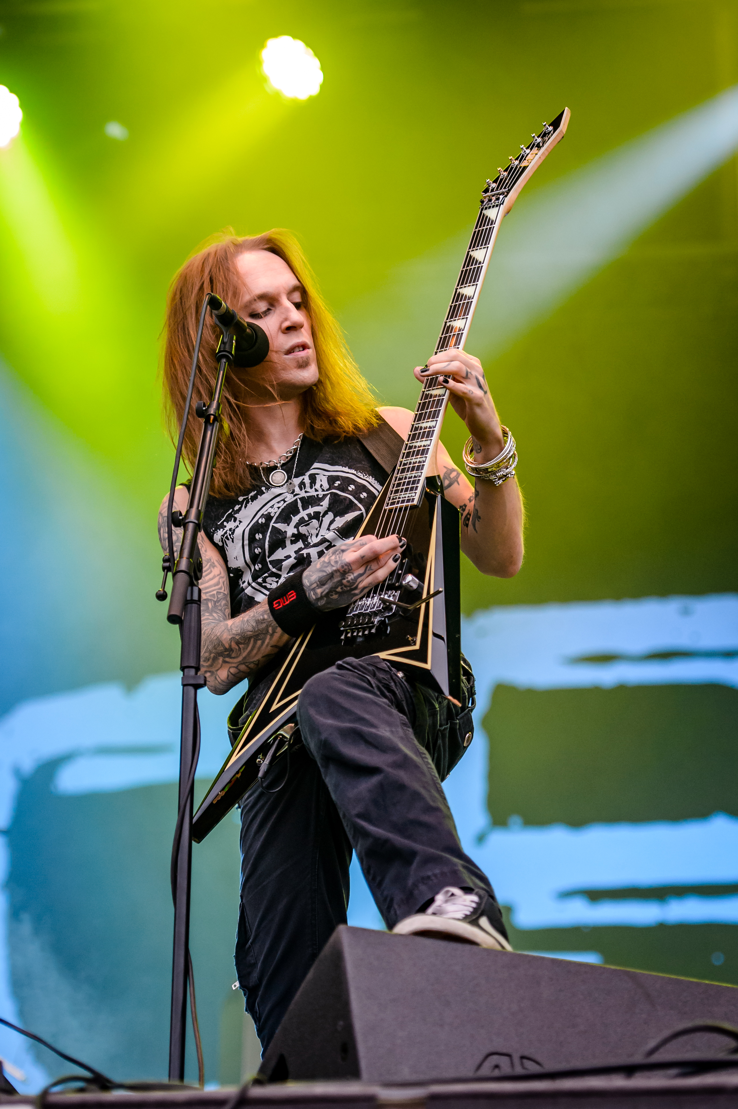 'RockHarz Open Air 2016; Ballenstedt': 'Children of Bodom'